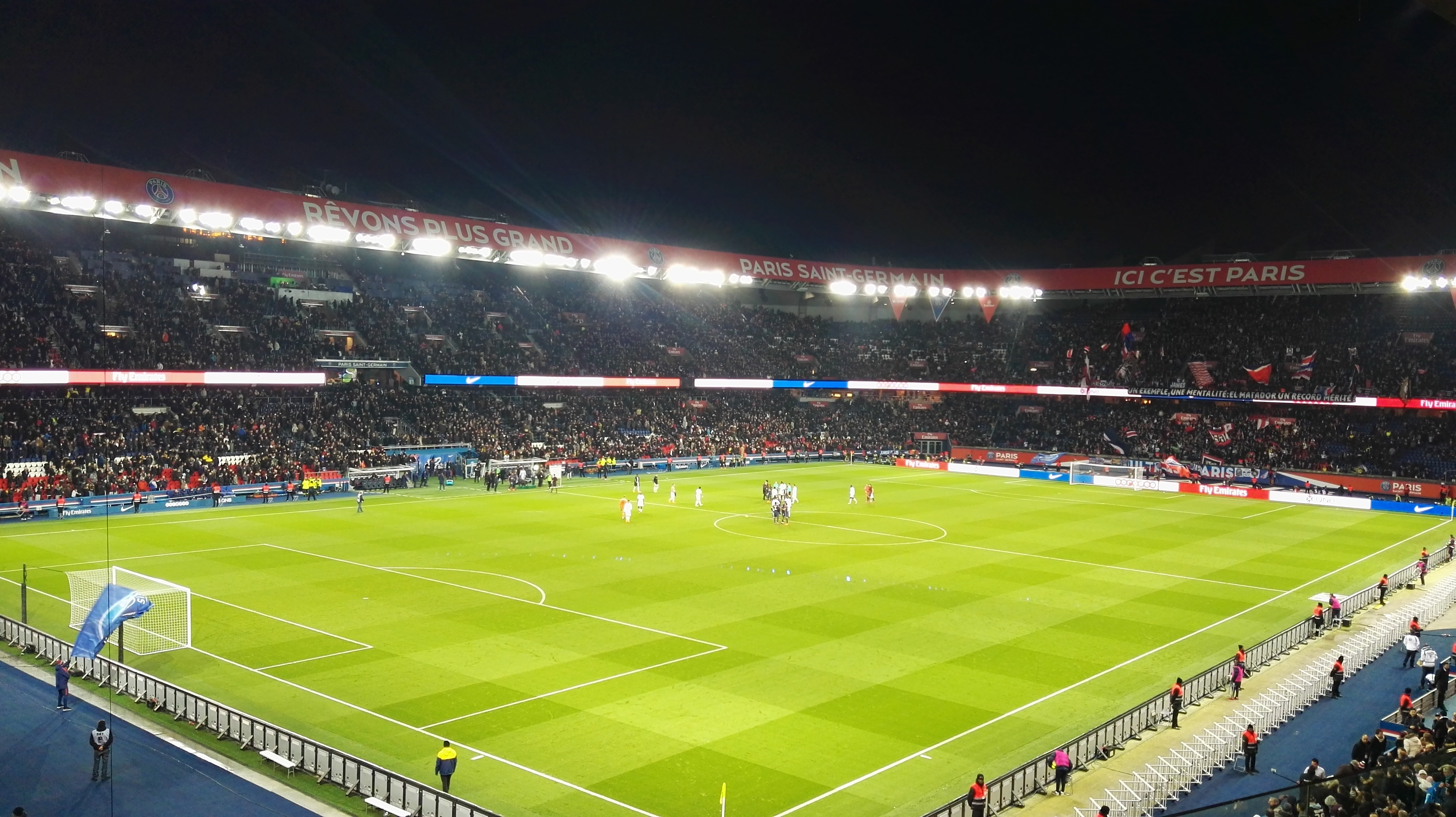 PSG